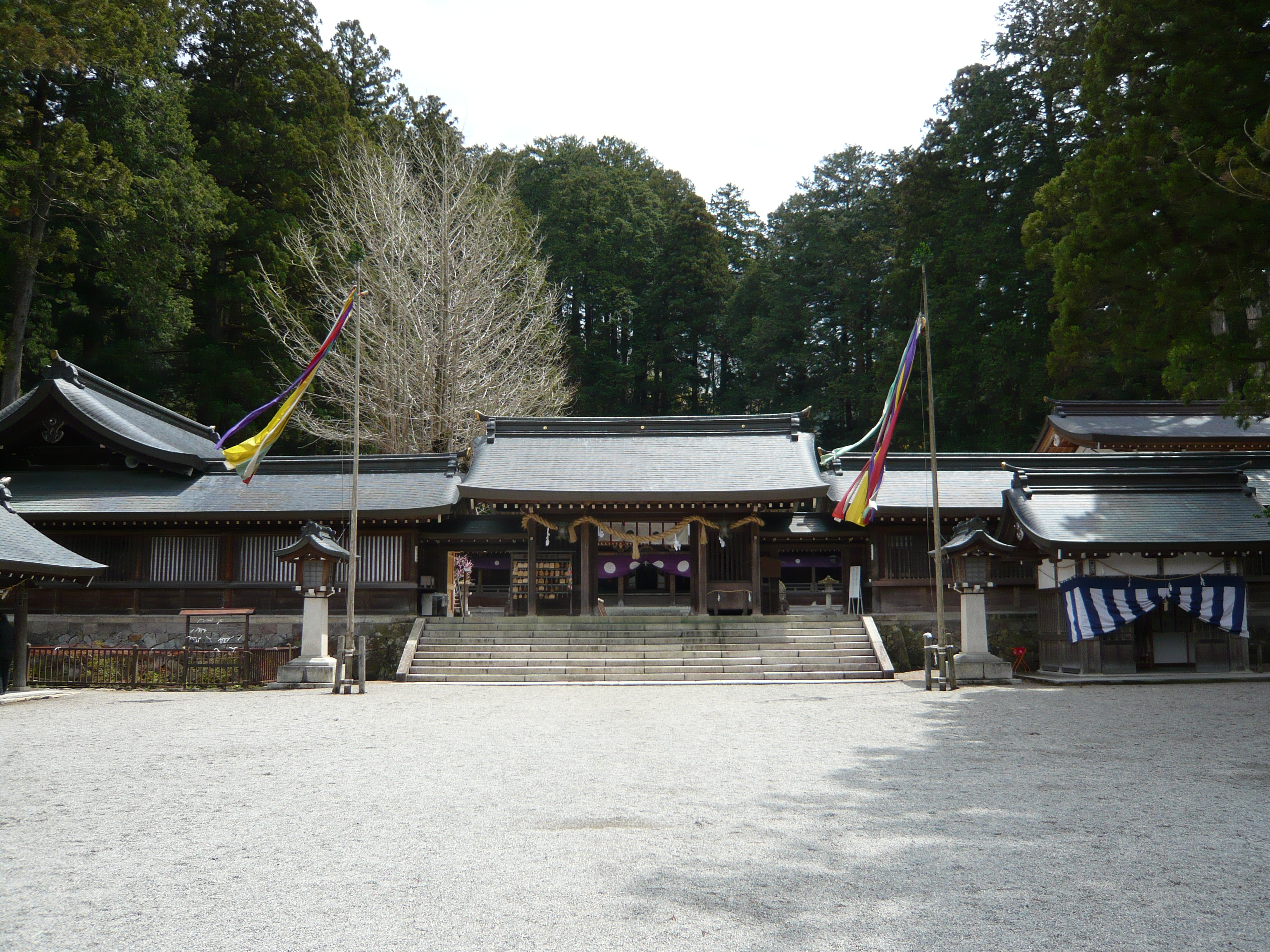 Hida-ichinomiya Minashi-jinja, Takayama, Gifu, Japan 飛騨一宮水無神社（岐阜県高山市）境内